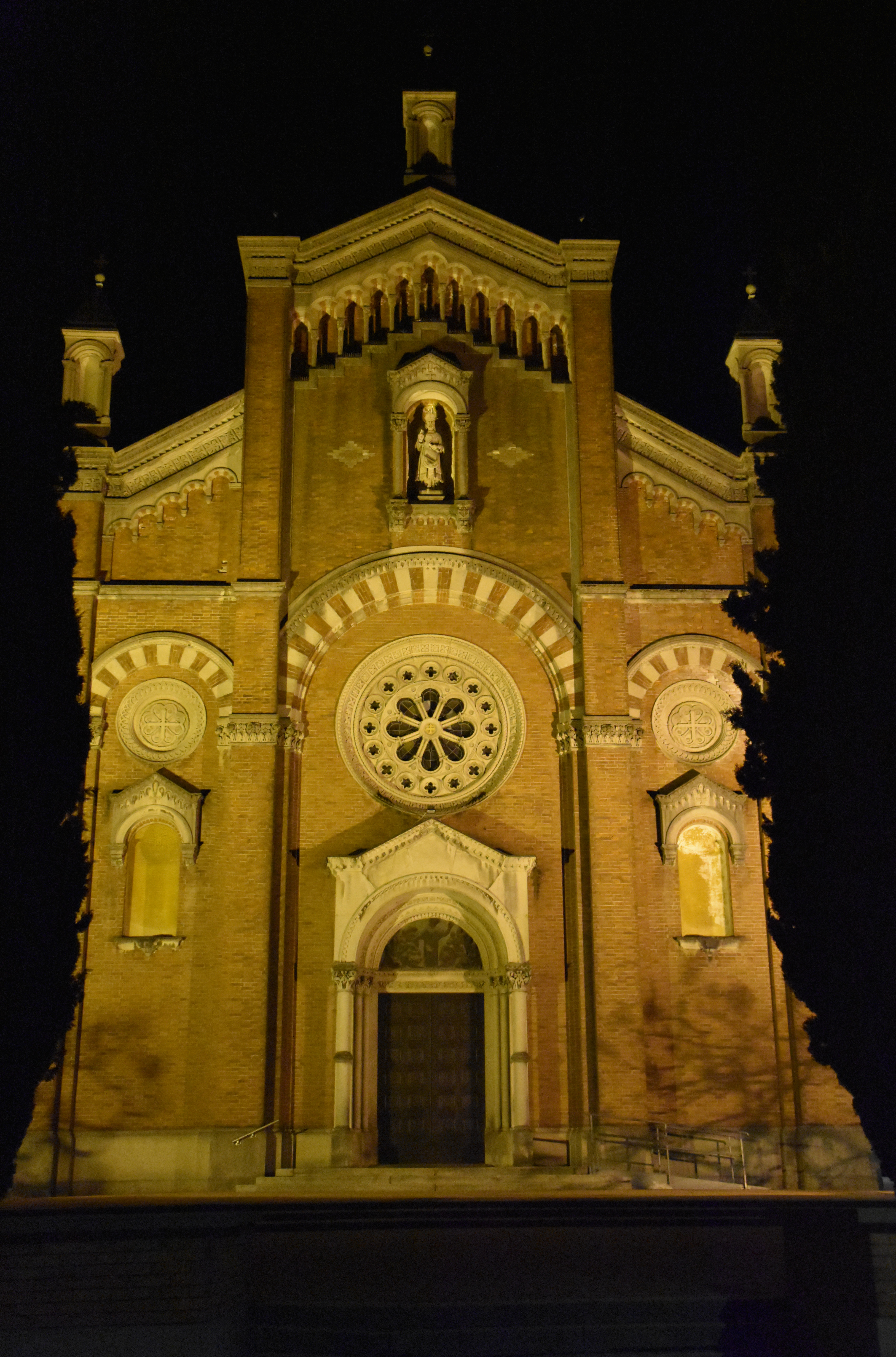 Foto notturna della facciata della chiesa di Sant'Ambrogio a Varese.